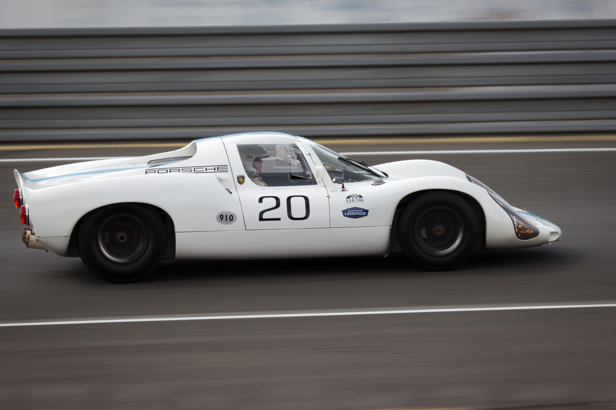 Le Mans Legend 2015 Driver: Rainer Becker